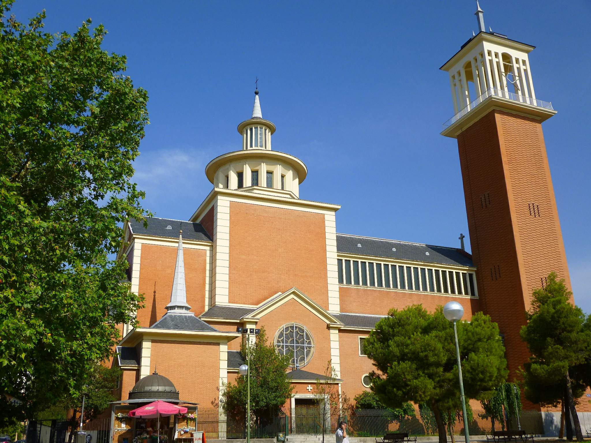 Santuario de Santa Gema (Madrid)